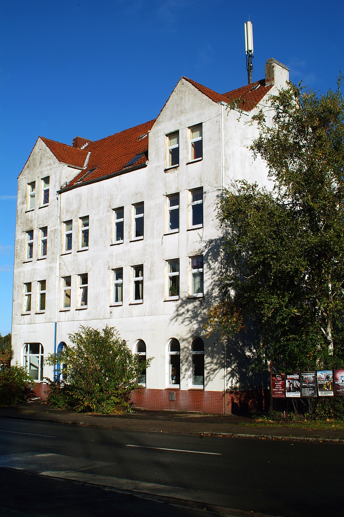 Das alte Wohn- und Geschäftsgebäude unter der heutigen Adresse Am Tönniesberg 9 in Hannover, Stadtteil Bornum; im Erdgeschoss des freistehenden Hauses finden sich Rundbogenfenster und separate Eingänge für die ehemaligen Geschäfte ...